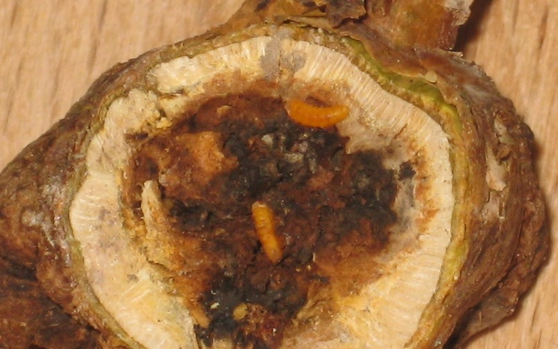 Larven der Himbeergallmücke in der typischen Galle einer Himbeerrute, etwa 4 Wochen vor der Verpuppung.